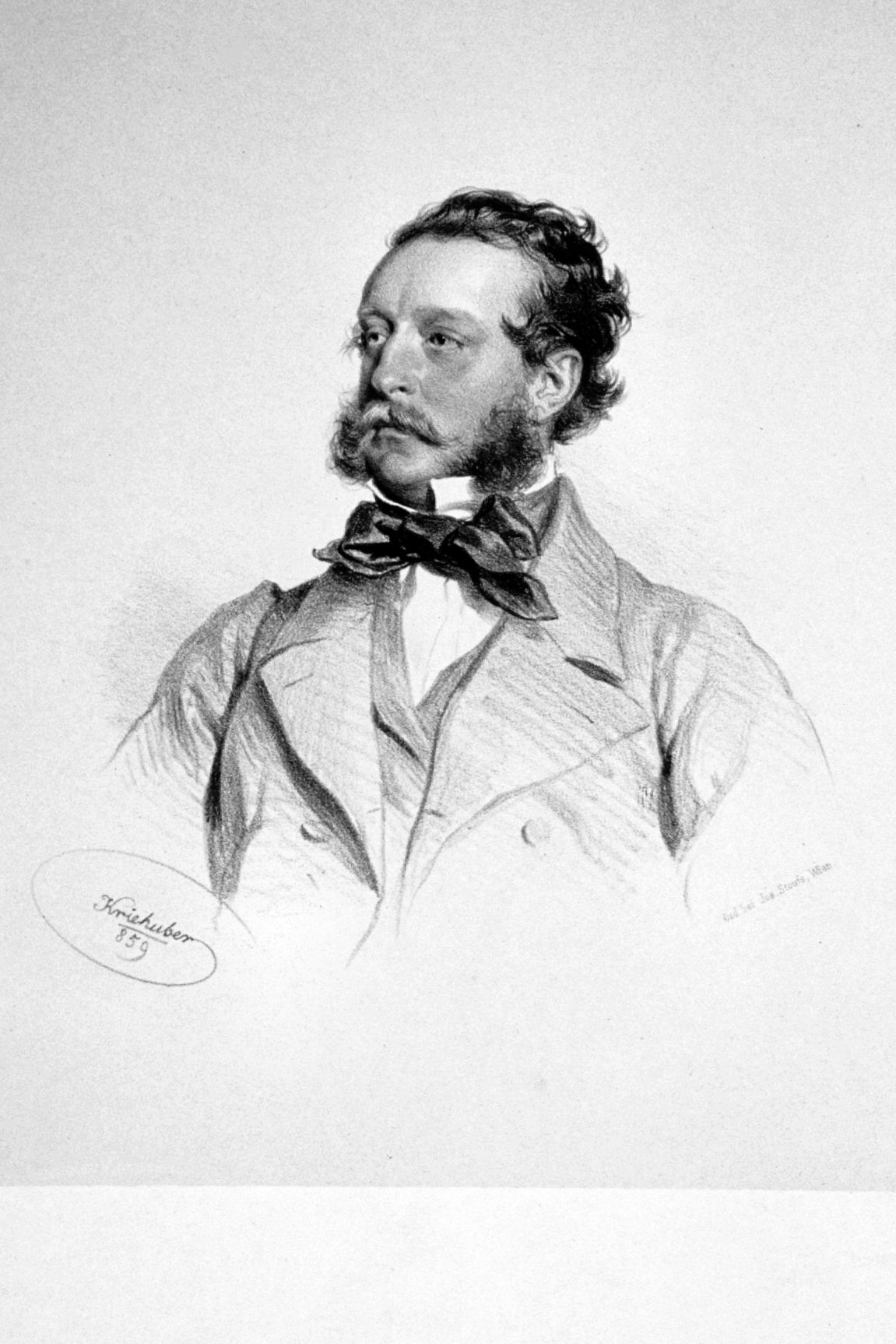 Nikolaus Zulauf Freiherr von Pottenburg (1822-1884), österreichischer Diplomat. Lithographie von Josef Kriehuber , 1859